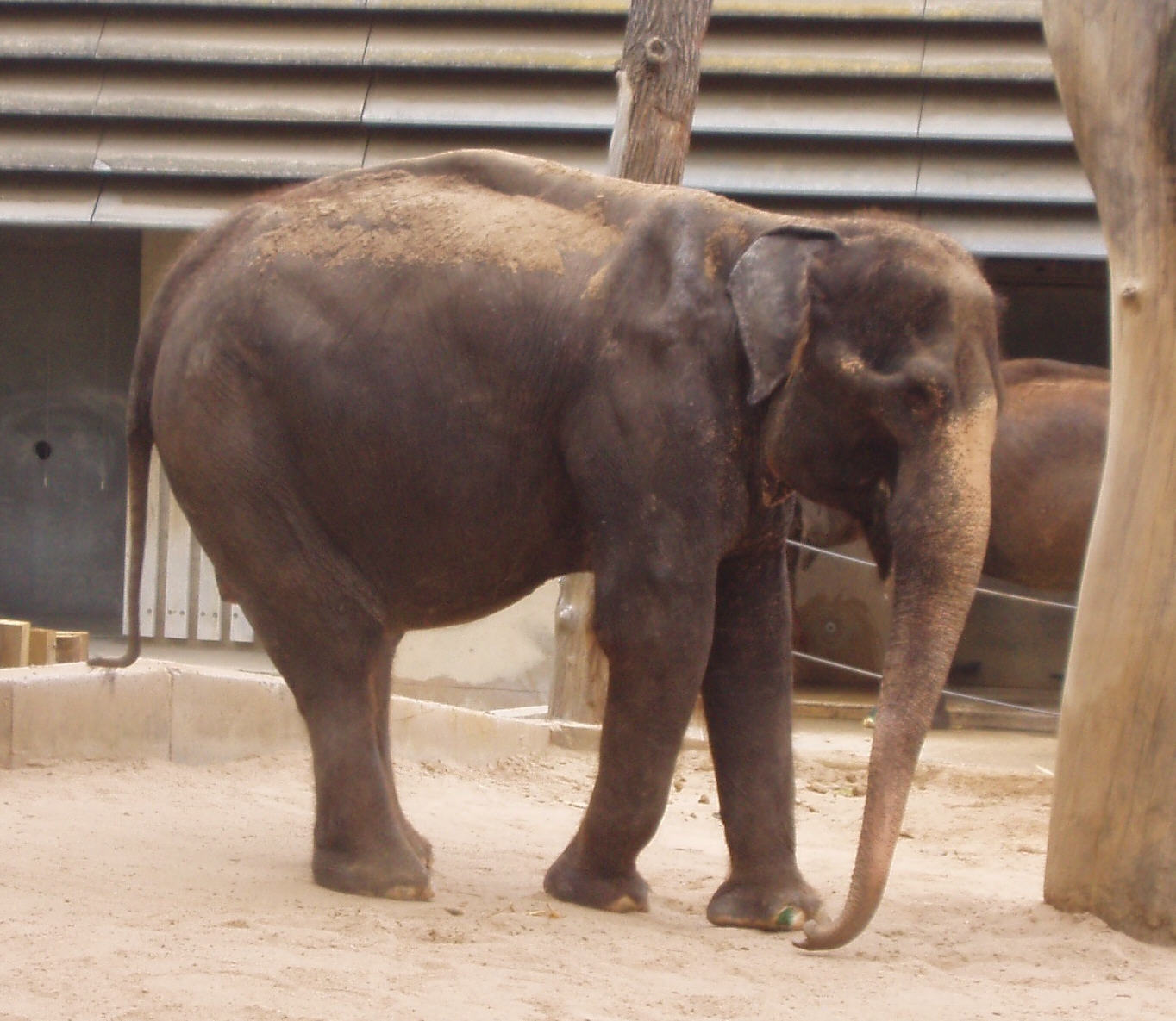 Elefantin Vilja